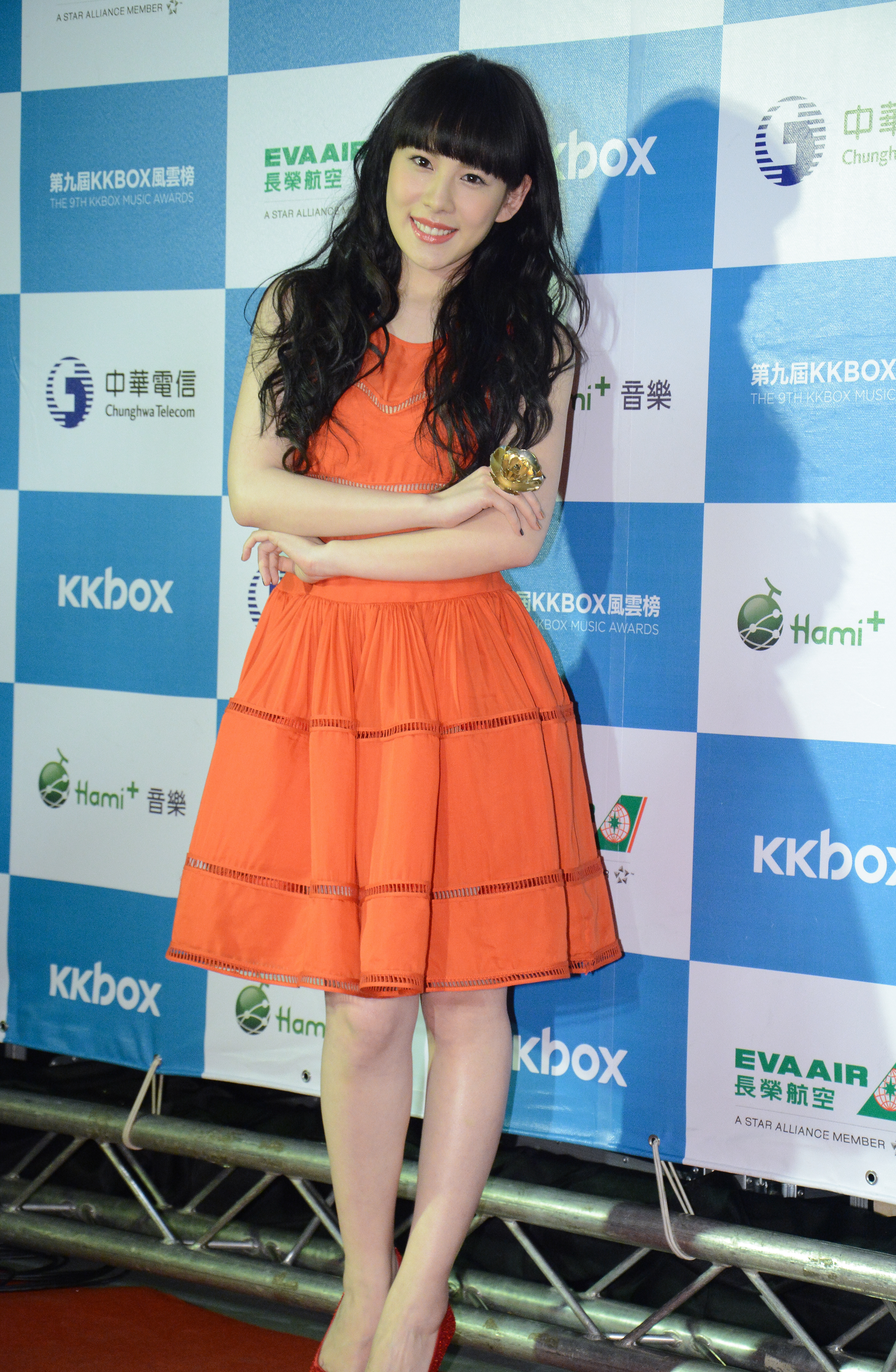 中文（台灣）: 王詩安出席第九屆KKBOX風雲榜。